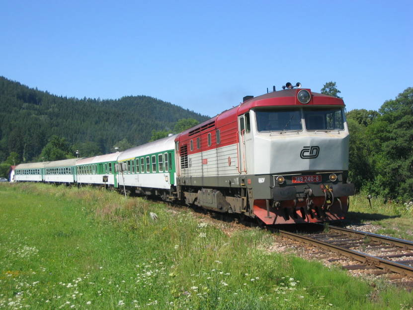 Lokomotiva řady 749, stanice Bohousová